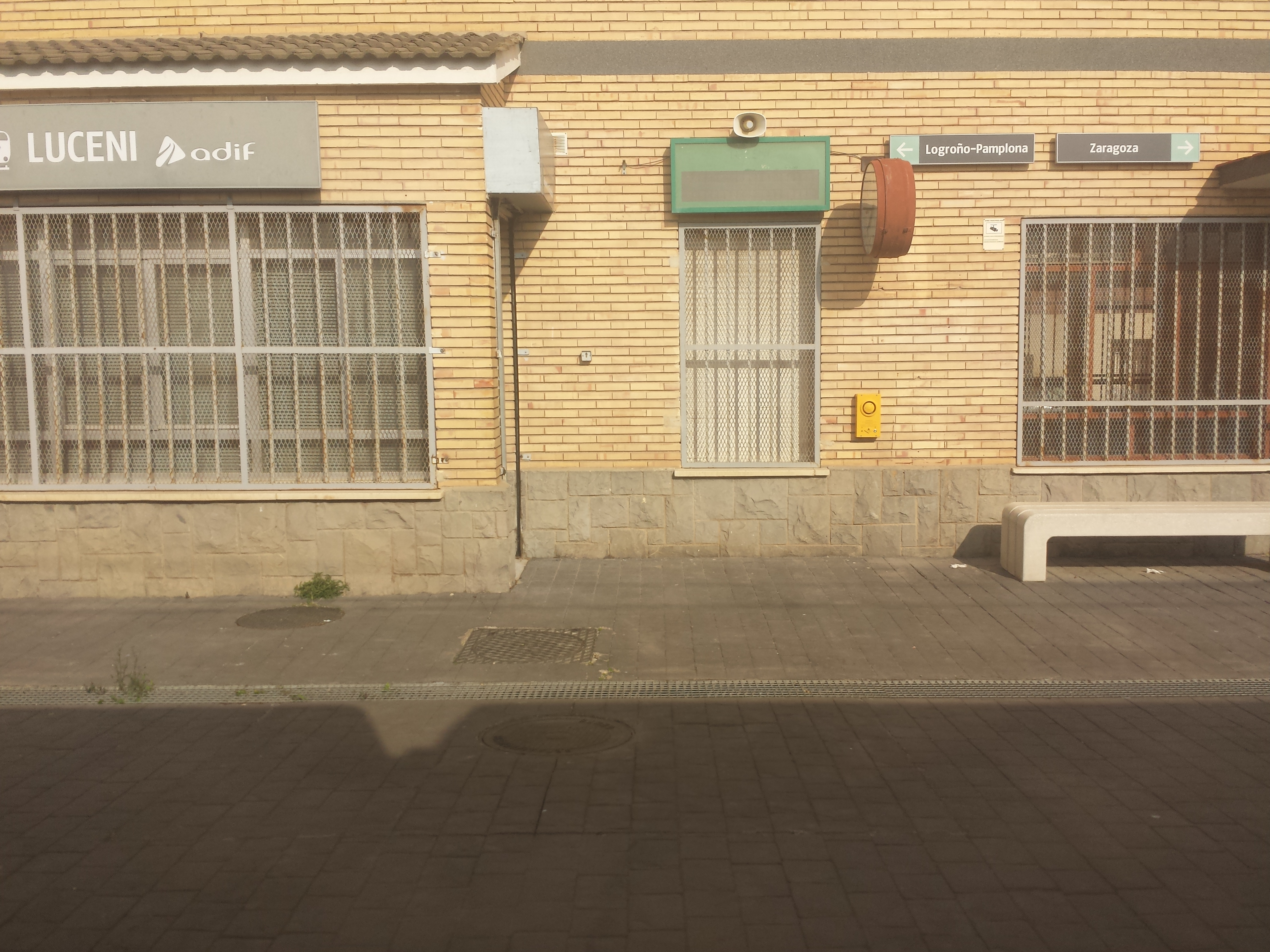 Estación de tren de Luceni, foto tomada desde el interior del tren.